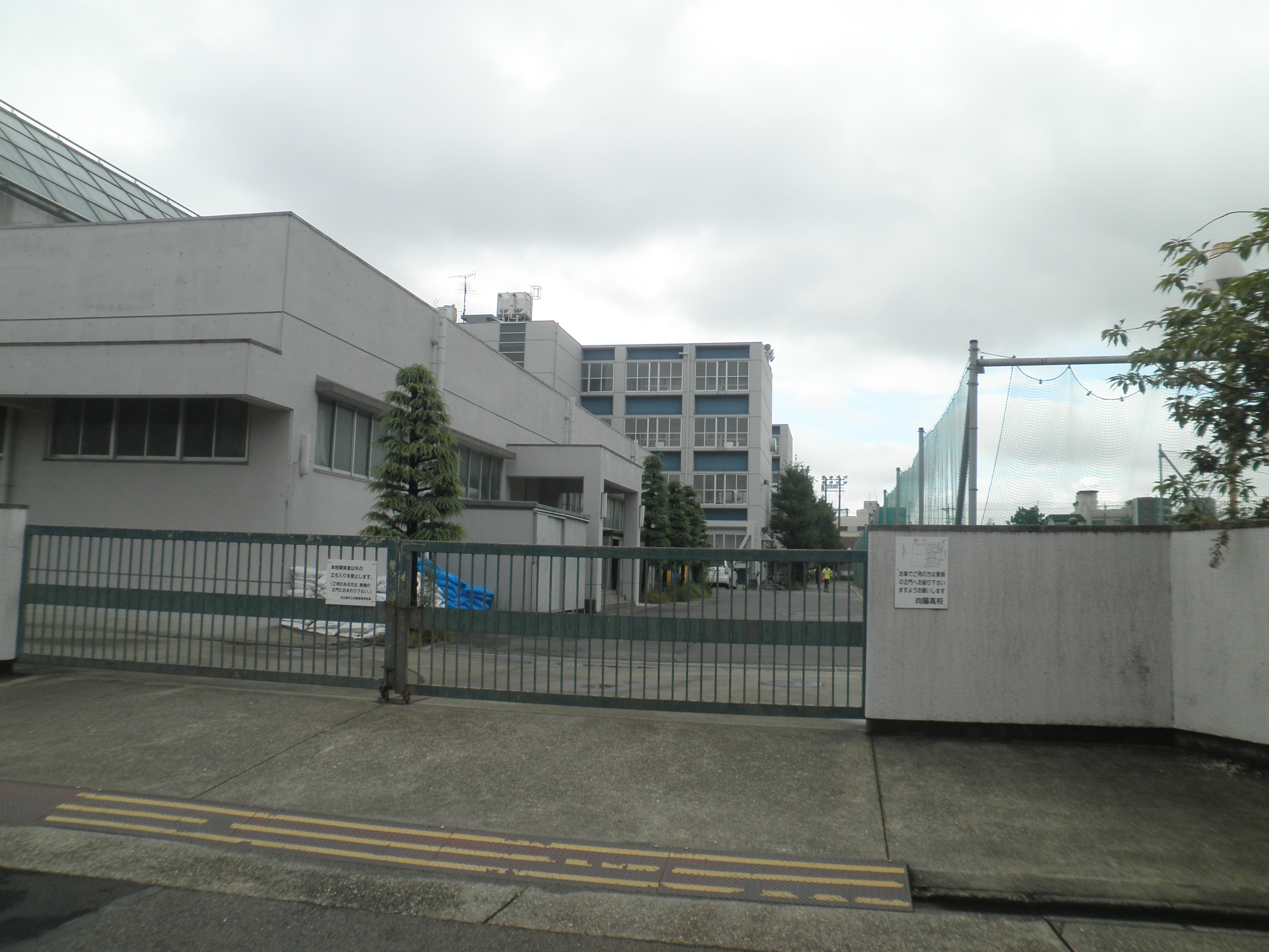 愛知県昭和区にある市立向陽高校